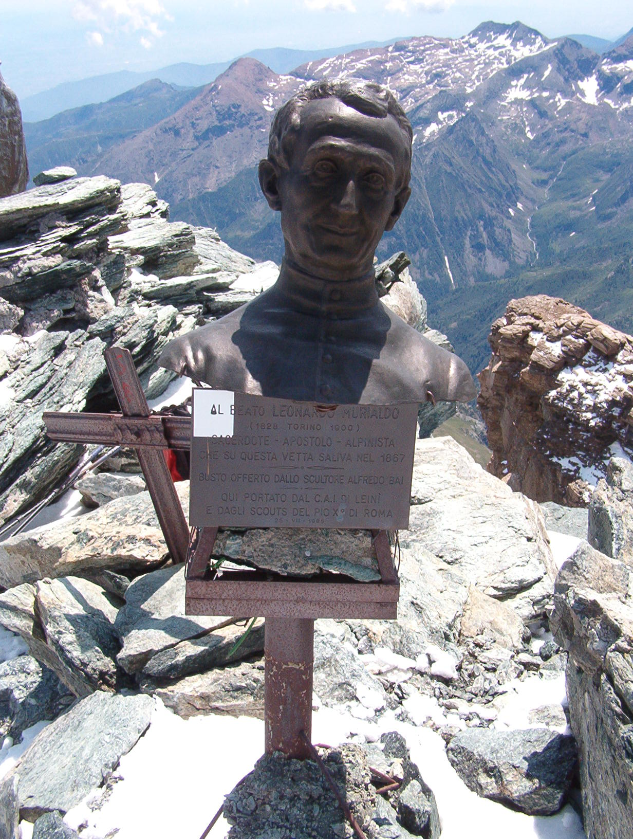 Busto Leonardo Murialdo - Uia di Ciamarella - Alpi Graie - Italia (by Alfredo Bai)